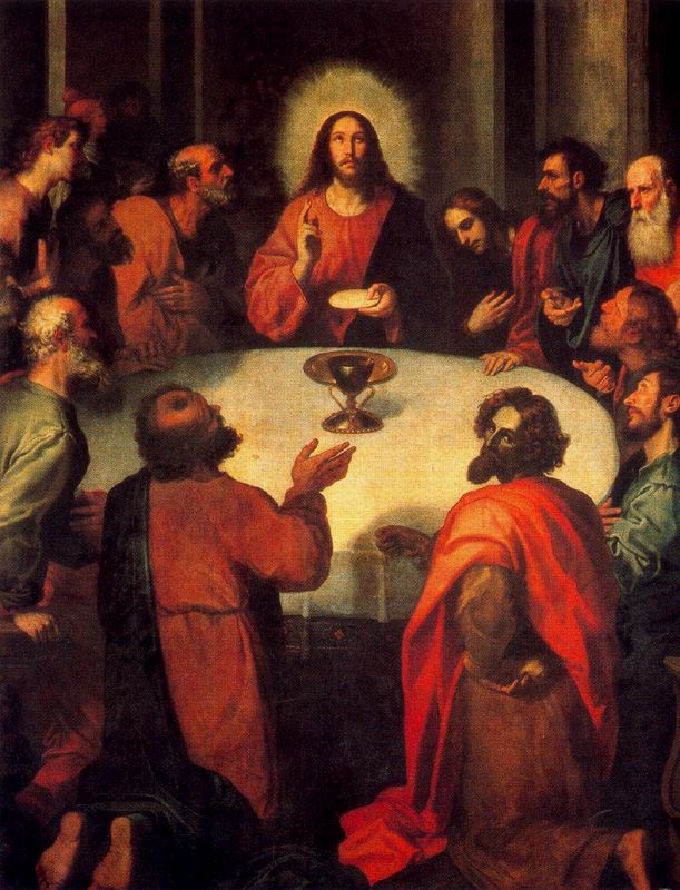 Francisco Ribalta, Última Cena, Valencia, Colegio del Patriarca (fragmento).